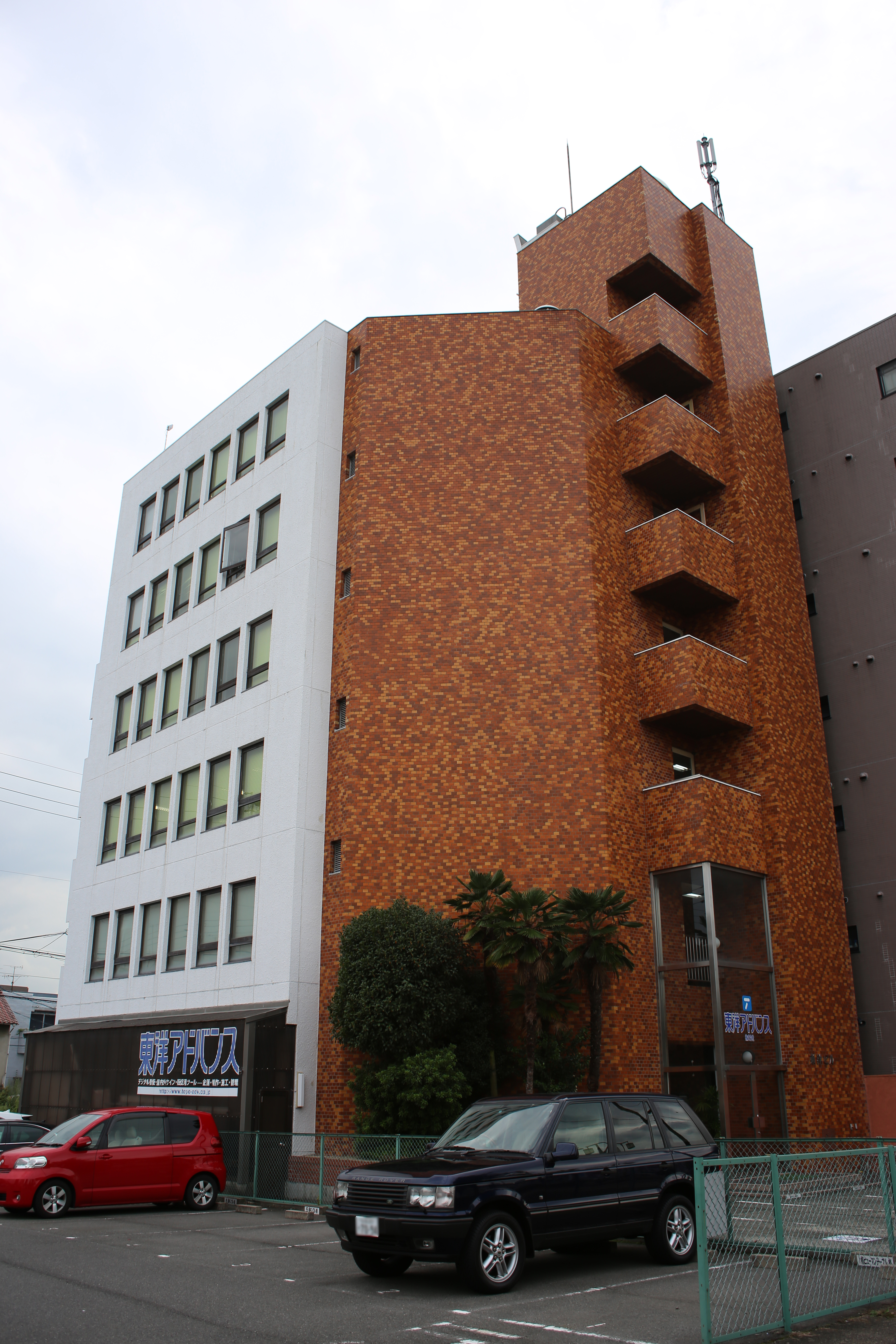 名古屋市昭和区御器所通の東洋ビルを北側公道東側より撮影。ただし、ナンバープレートにつき画像処理済。